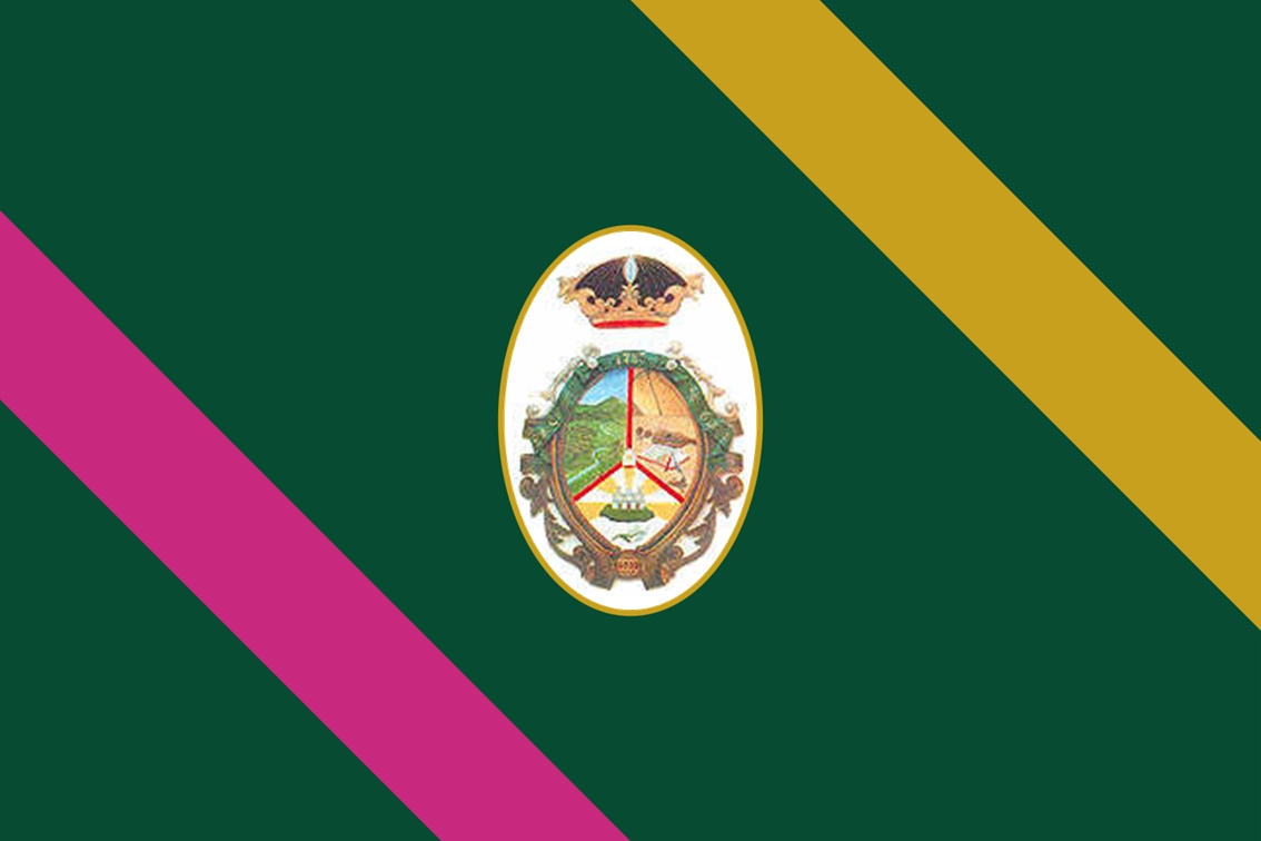 Bandera Oficial del Municipio San Casimiro, Venezuela, Estado Aragua.